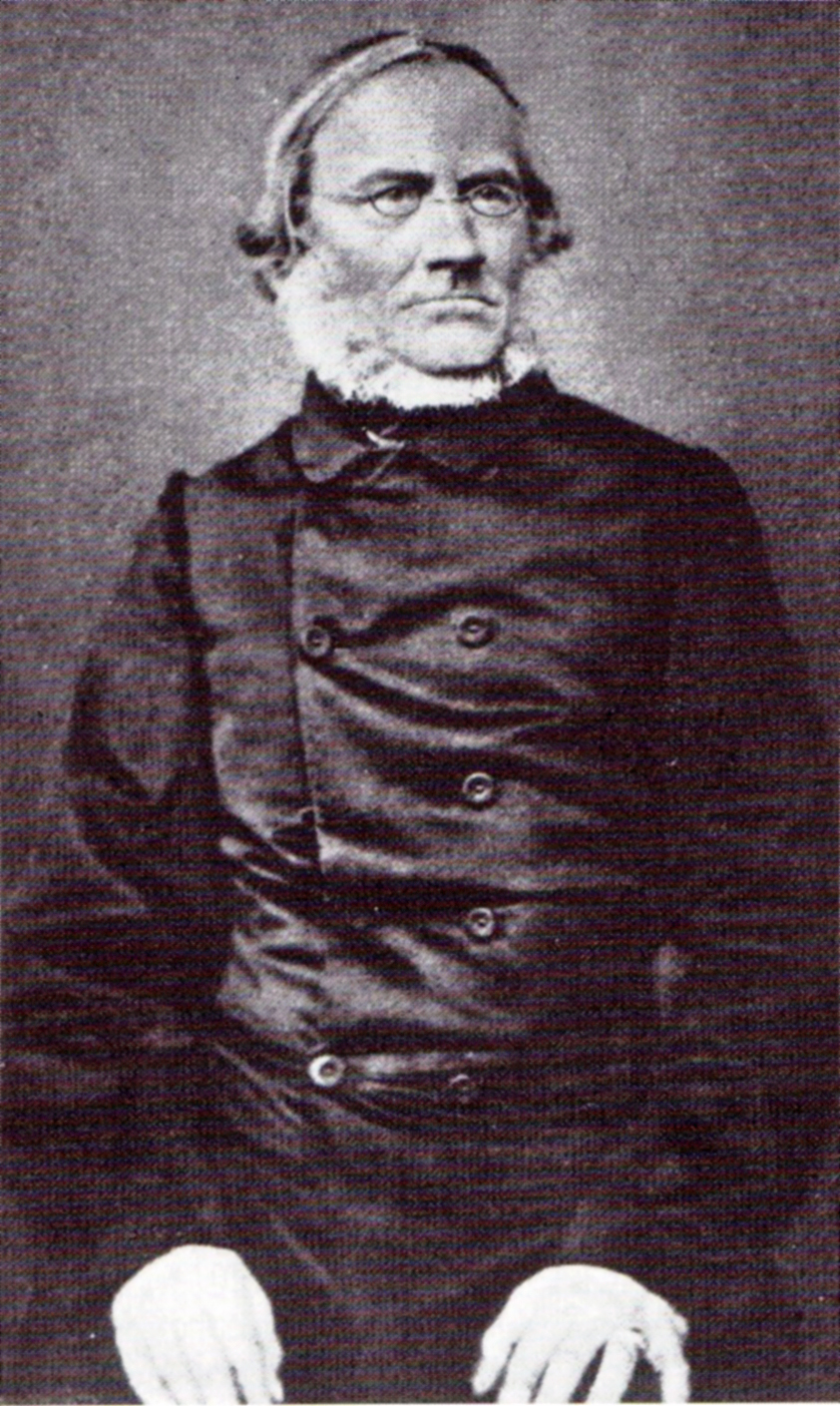 Fotografie von Julius Rupp